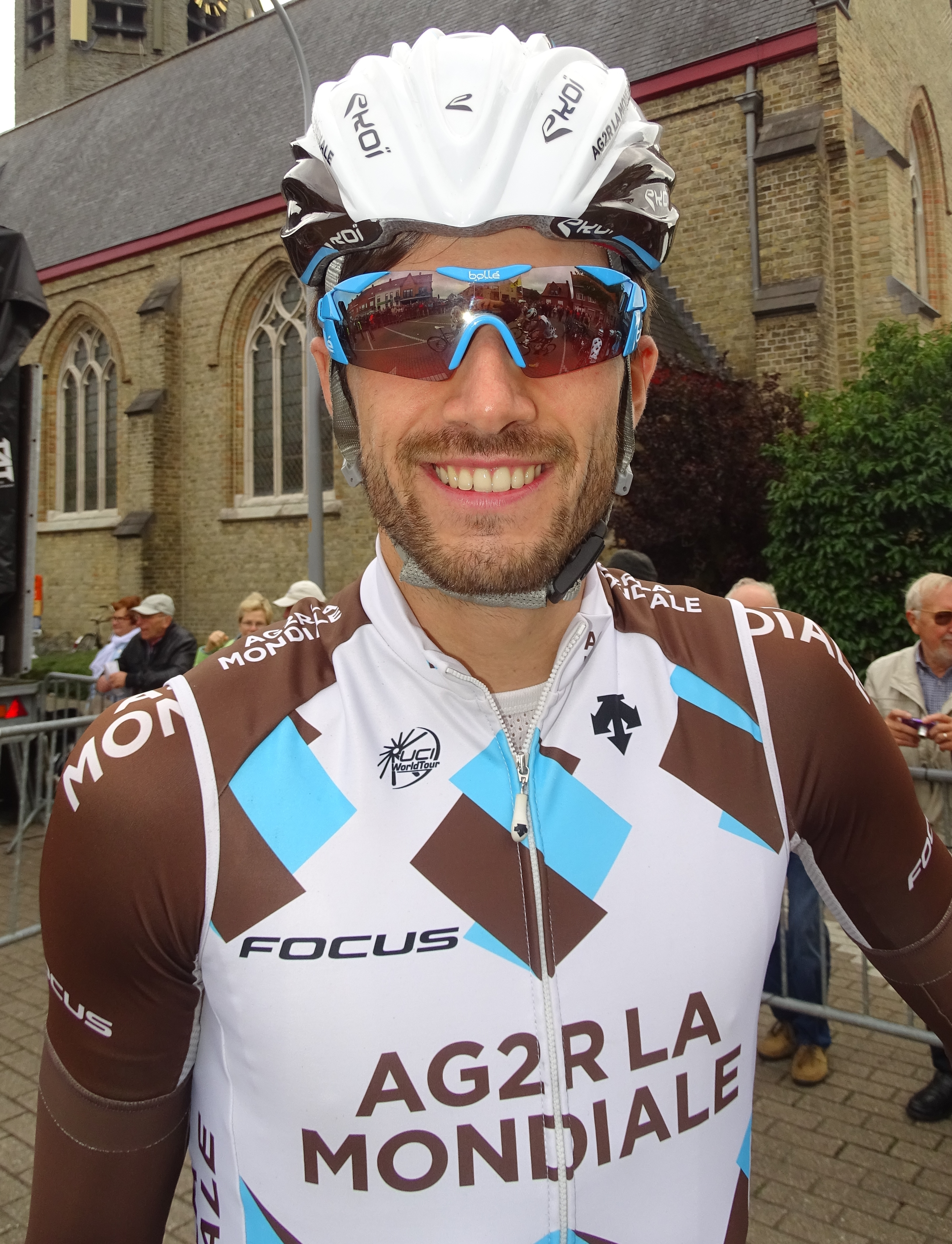 Reportage réalisé le vendredi 18 septembre à l'occasion de l'arrivée du Championnat des Flandres 2015 à Koolskamp (Ardooie), Belgique.